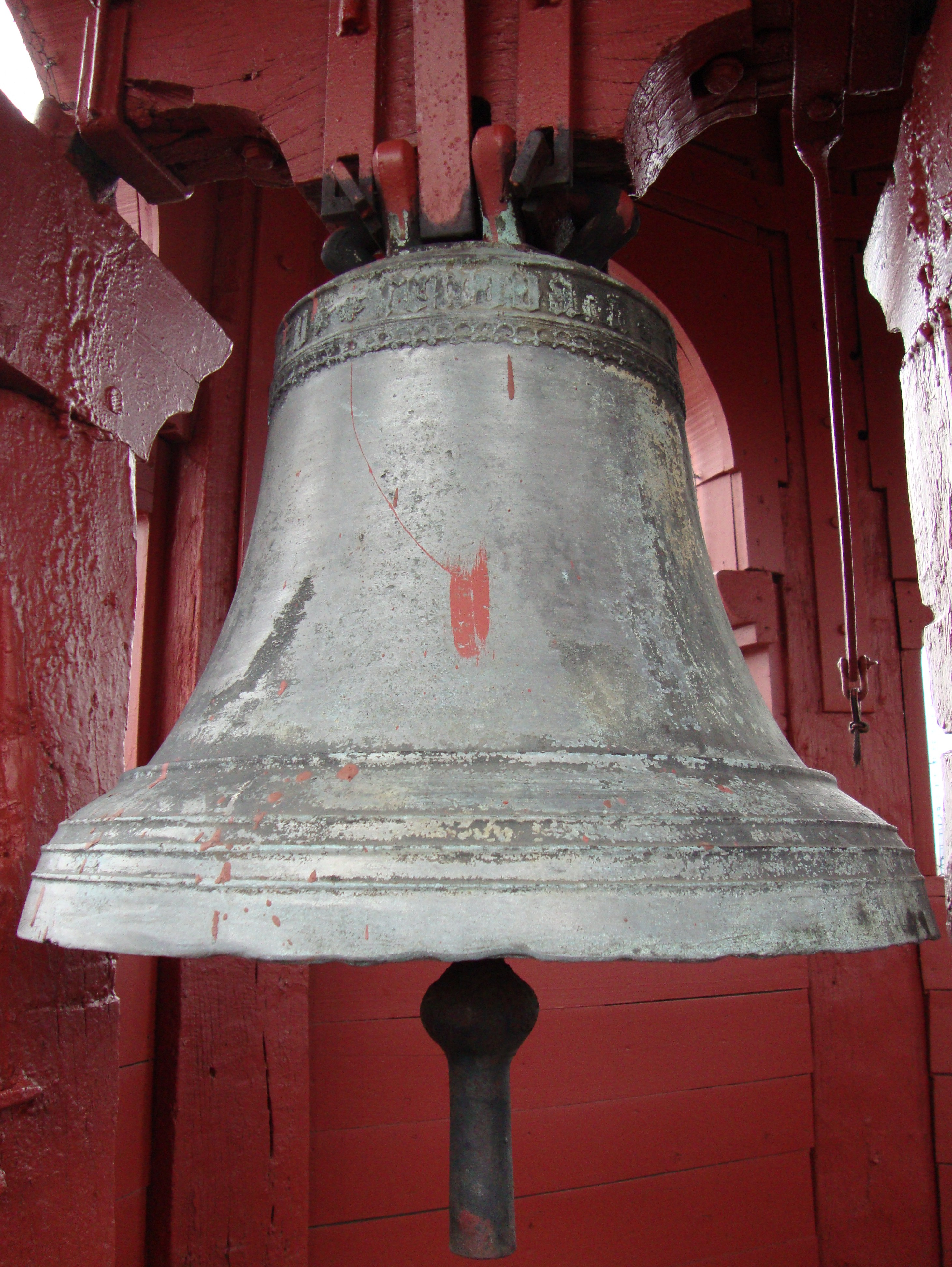 Bonn, Namen-Jesu-Kirche. Brandglocke (1535).